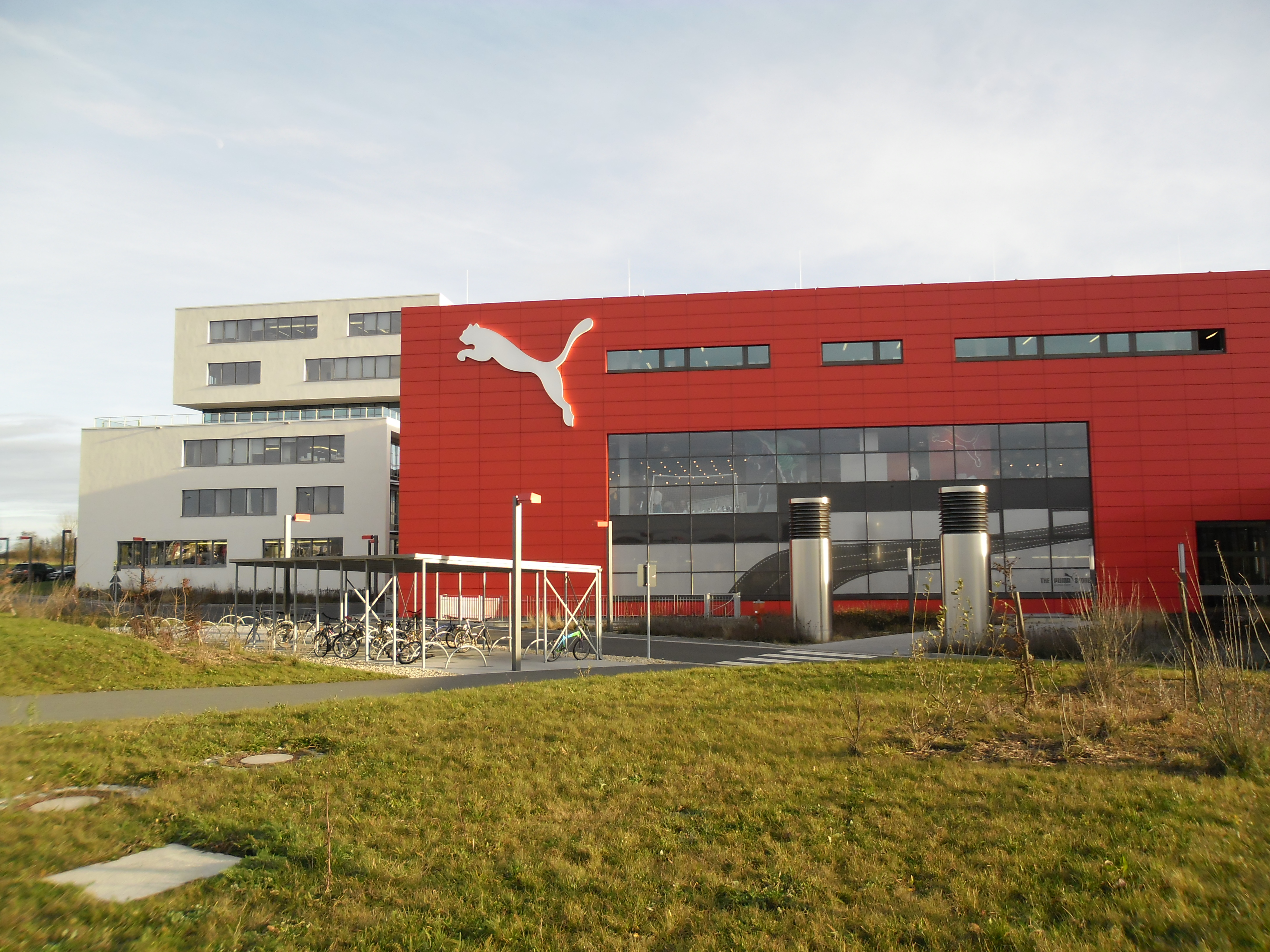 Das PUMA Factory-Outlet-Center in Herzogenaurach in der Zeppelinstraße 2 südwestlich vom Hans-Ort-Ring